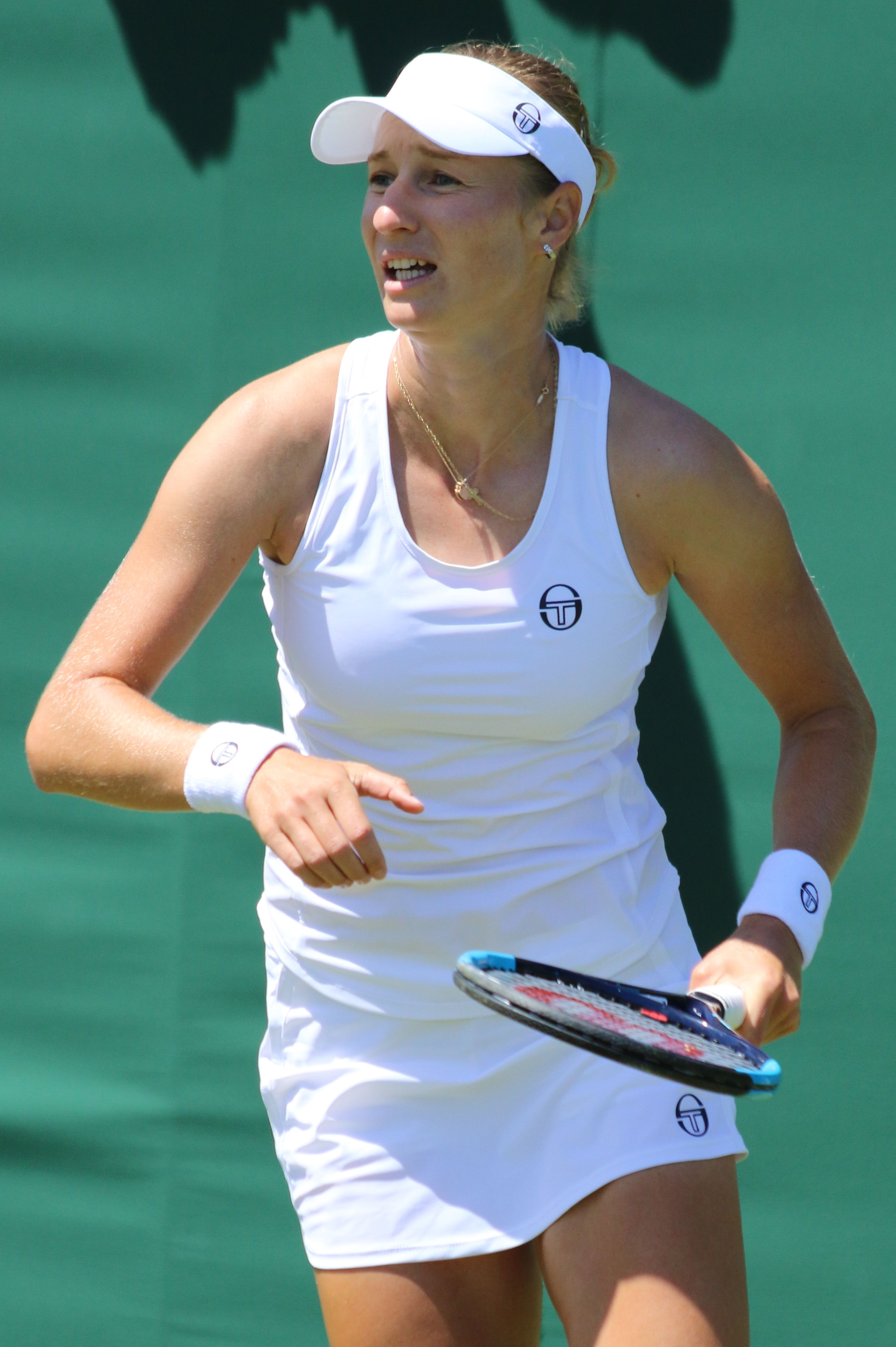 Makarova WM18 (1)